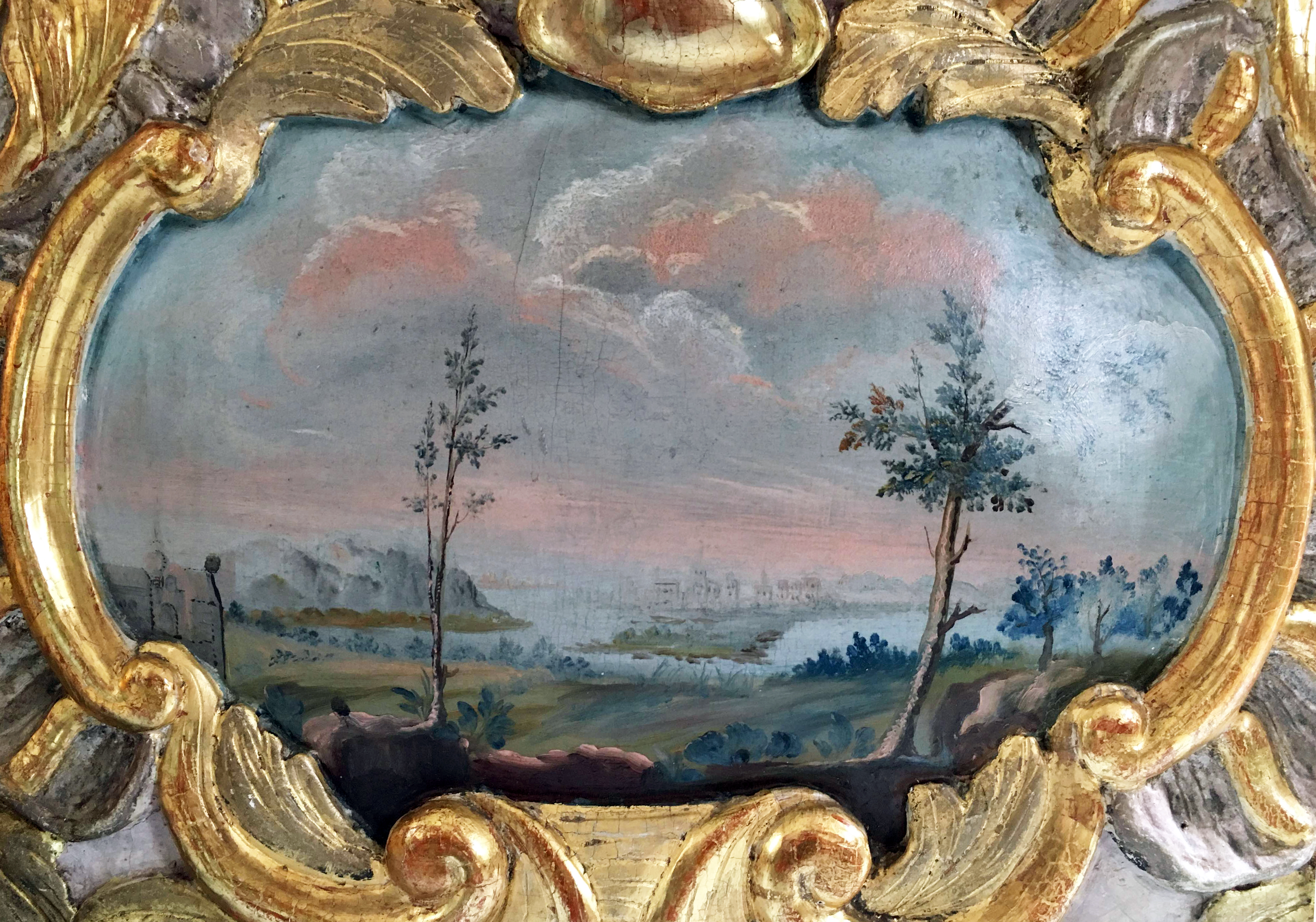 Målning på altarringen i Hackås kyrka utförd av Anders Berglin (1737-1805), föreställande utsikten från Hackås mot Storsjön och Hoverberget. Painting by Anders Berglin (1737-1805) in Hackås Church, Jämtland.